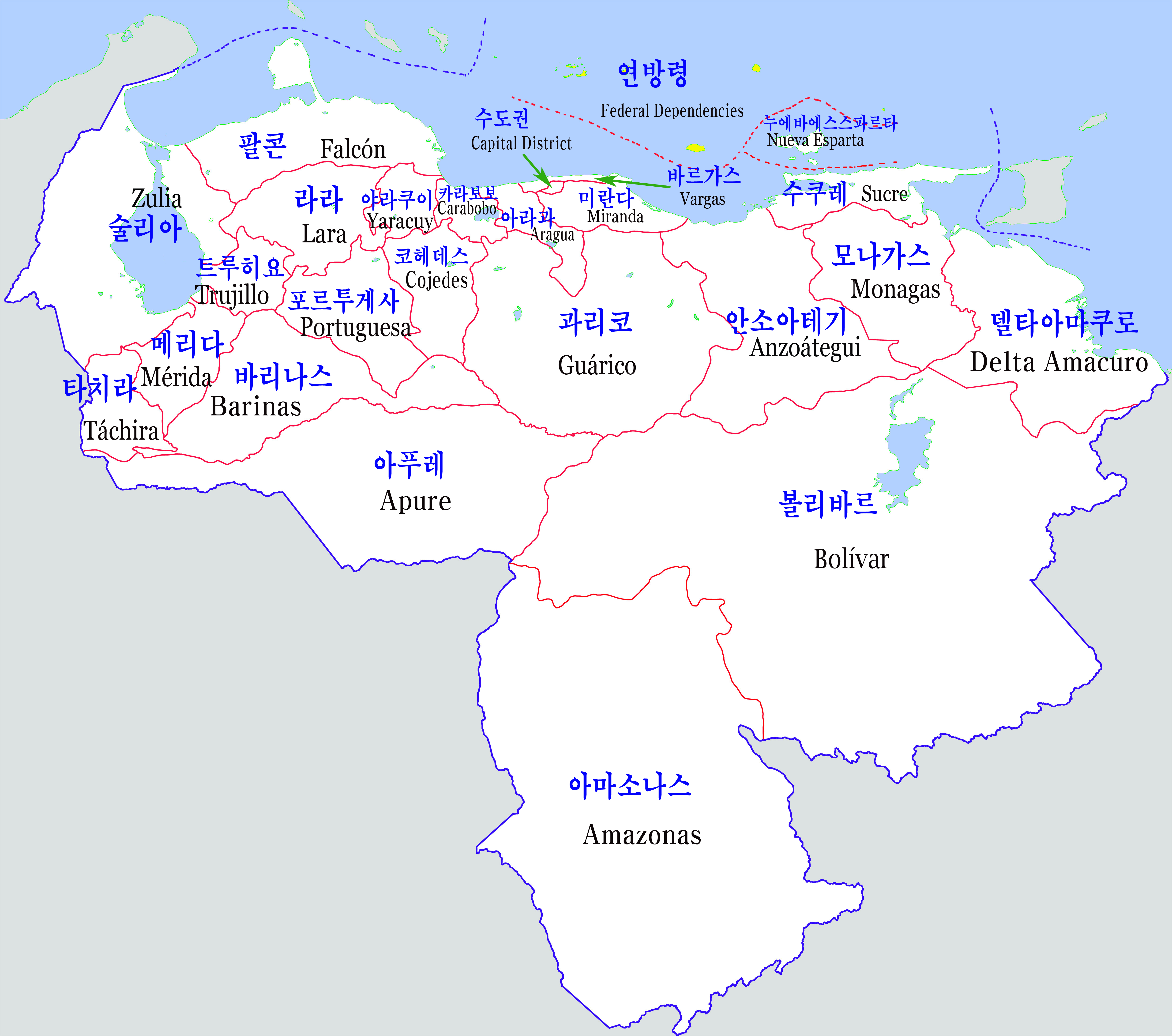 베네스엘라 행정구역